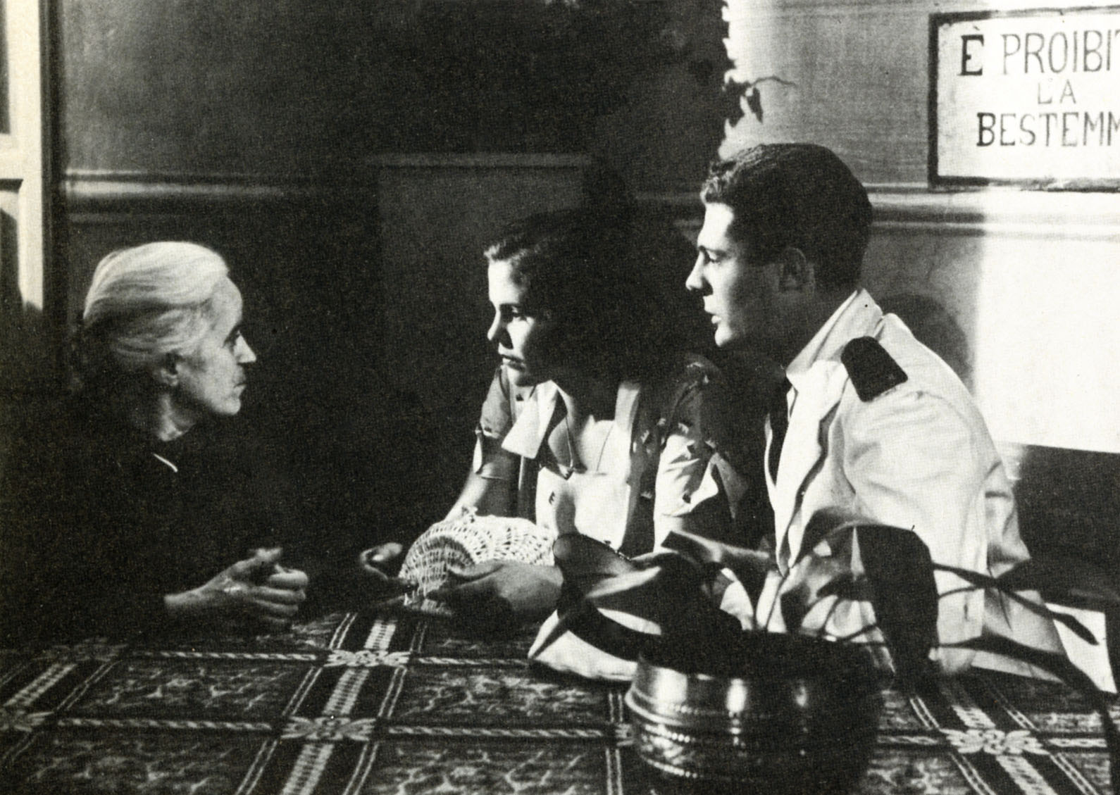 foto di scena film Domenica d'agosto